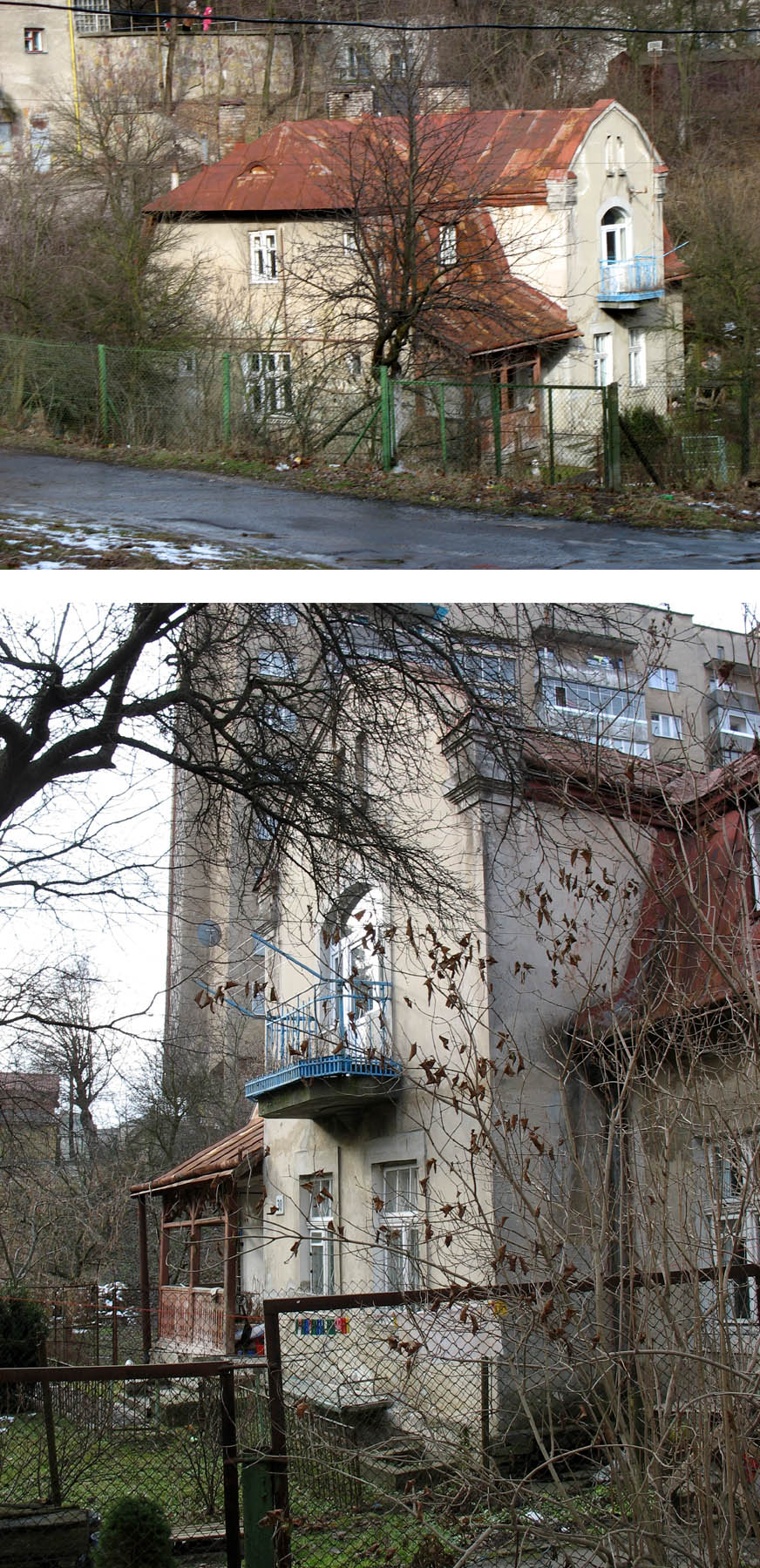 Колаж із фотографій, що зображають